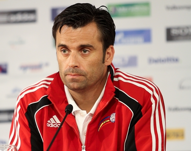 Кольдо — тренер национальной сборной Андорры.